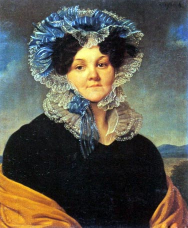 Охотникова Наталья Григорьевна , урождённая Вяземская (1760-е - 18?), дочь статского советника князя Григория Ивановича Вяземского, супруга майора Охотникова.